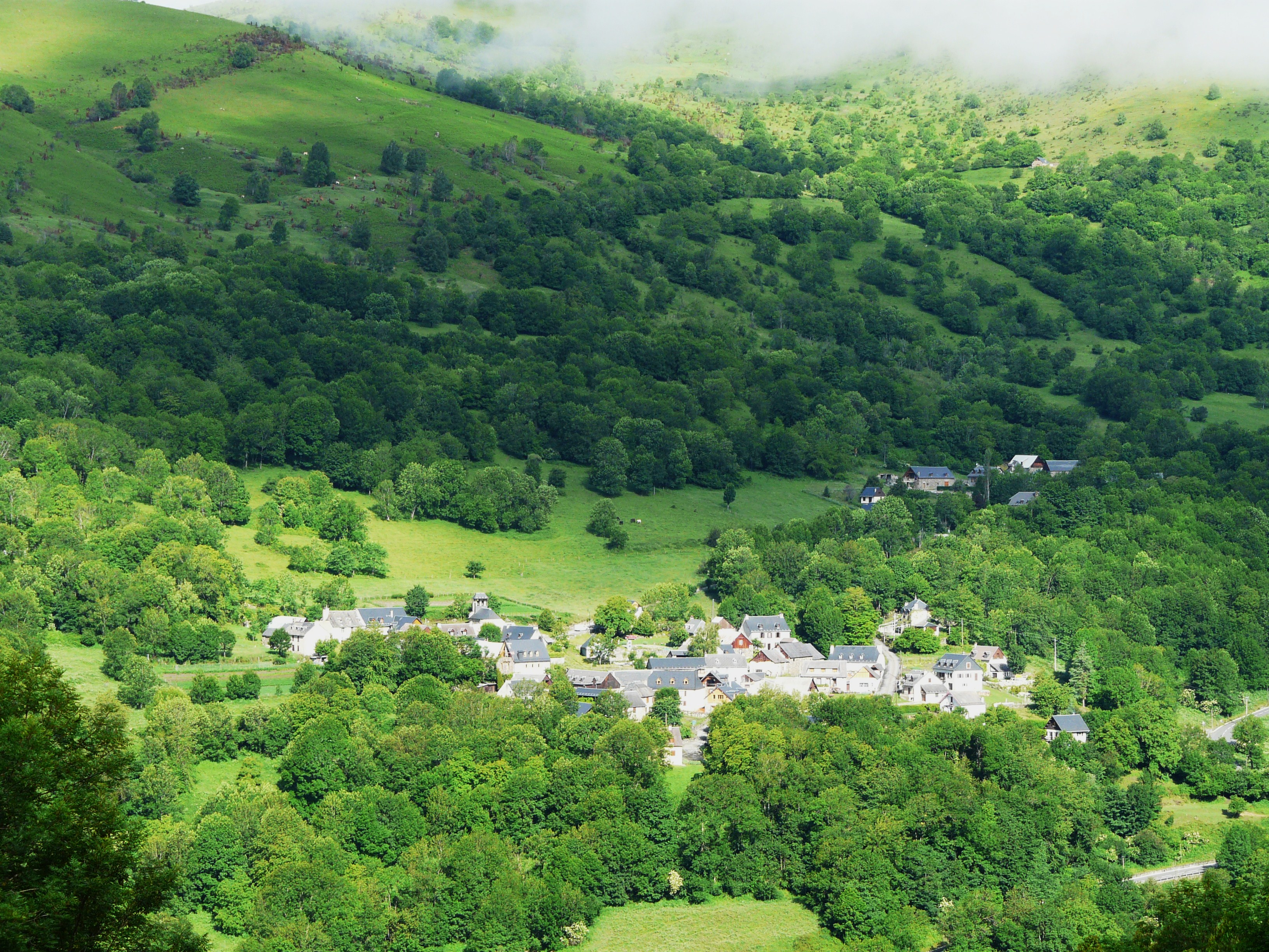 Les villages de Benque-Dessous et Benque-Dessus vus depuis Saccourvielle, Haute-Garonne, France.